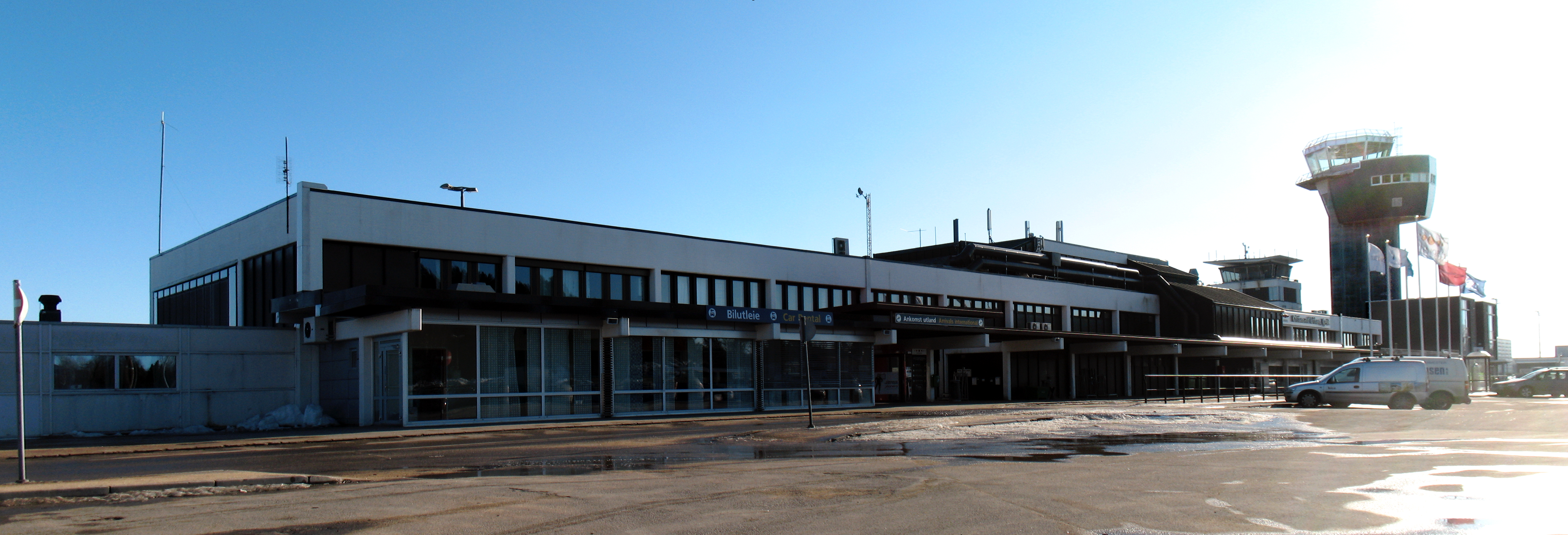 Avgang- og ankomsthallen ved Kjevik flyplass.